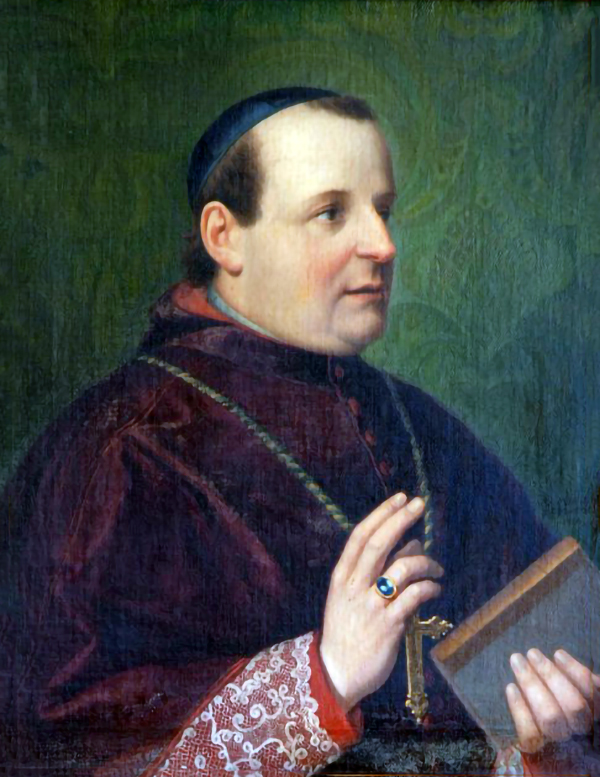 Marini Antonio (1856), Ritratto di monsignor Giovanni Antonio Benini